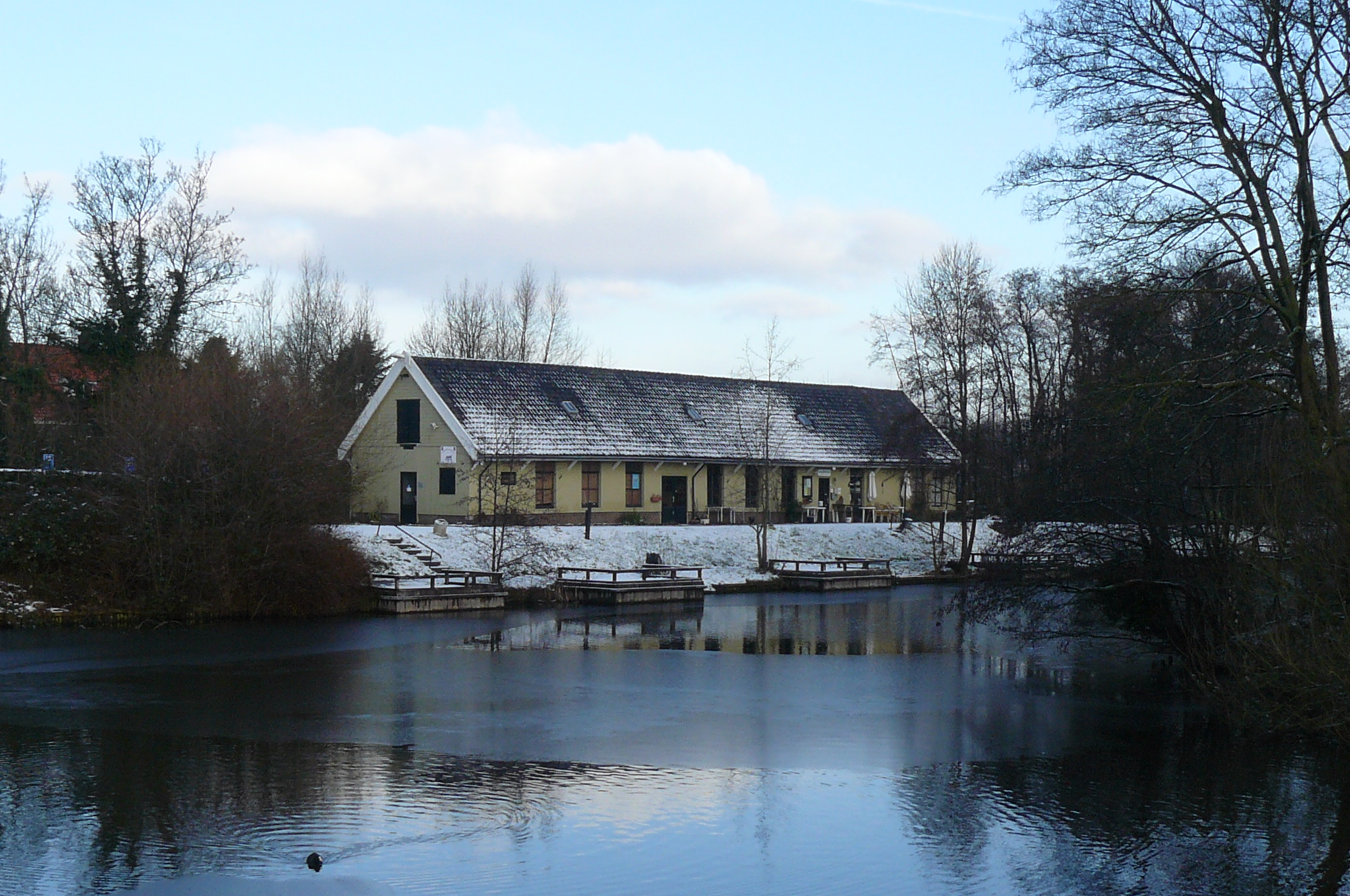 Houten genieloods van het Fort bij Abcoude gezien vanaf de weg langs het fort.